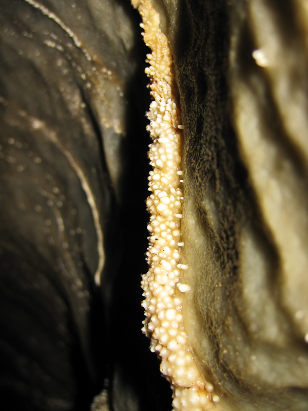 Korallformation i Korallgrottan.